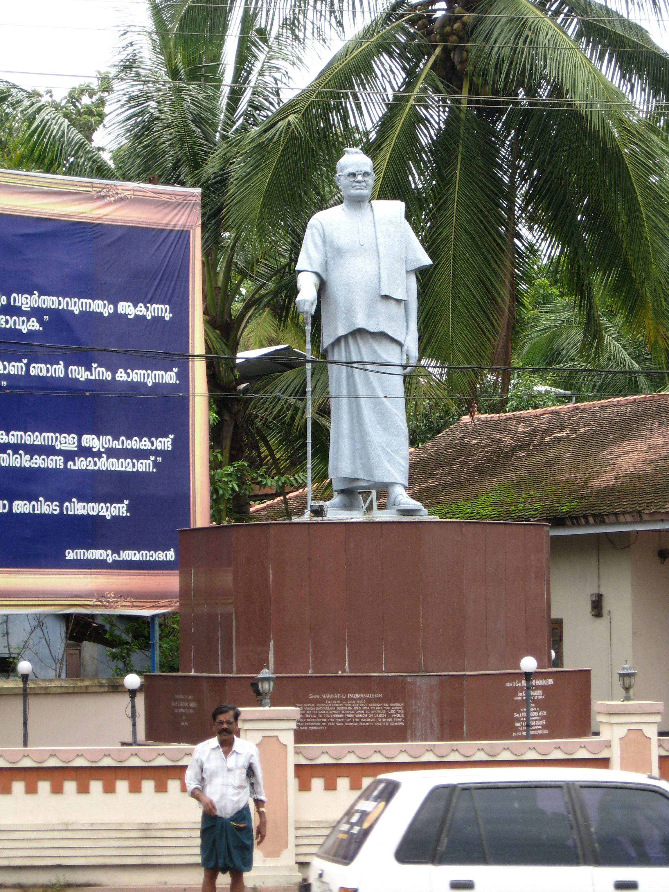 വൈക്കം നഗരമദ്ധ്യത്തിൽ മന്നത്തു പത്മനാഭന്റെ പ്രതിമ